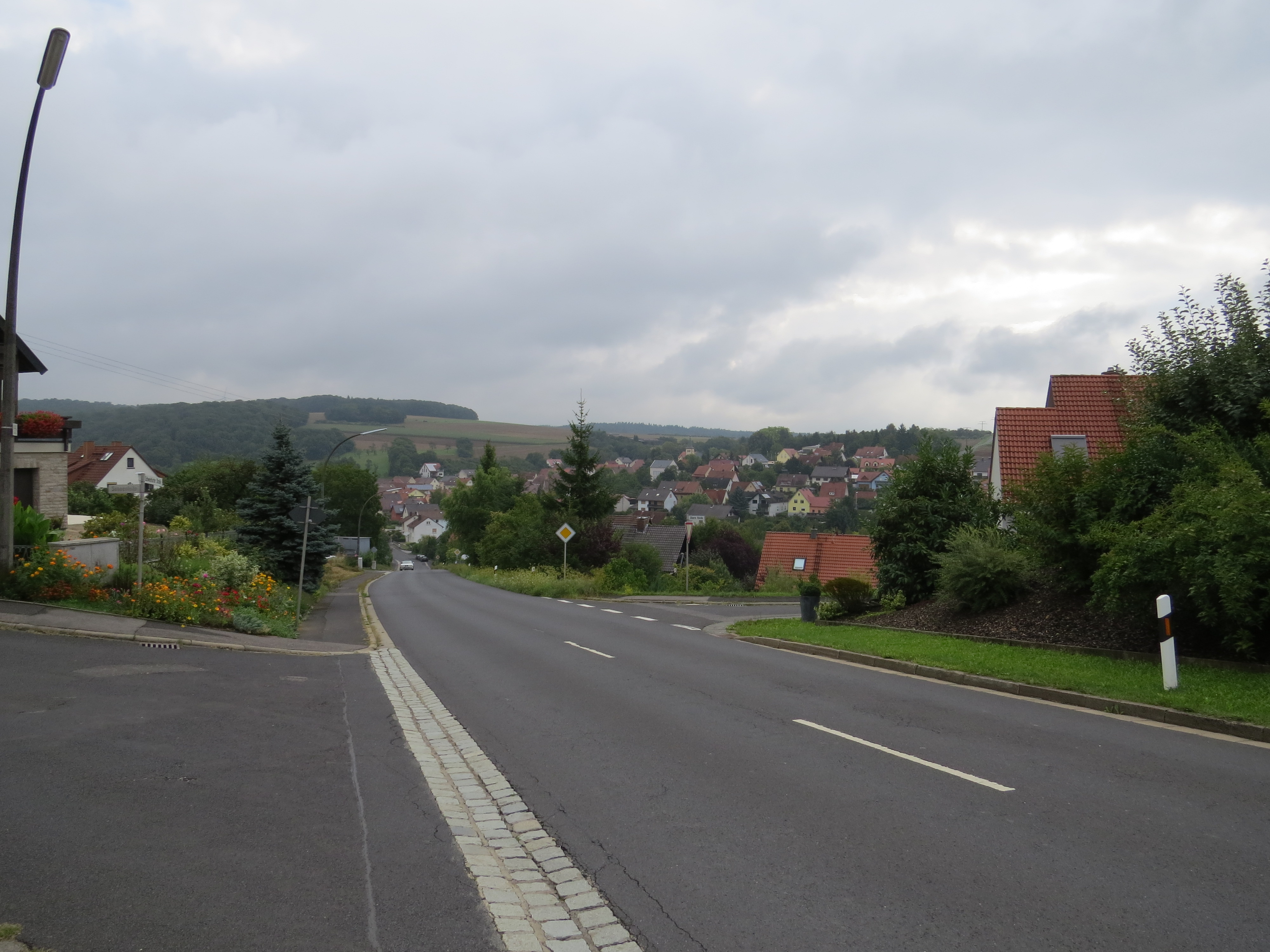 Üchtelhausen von Südwesten